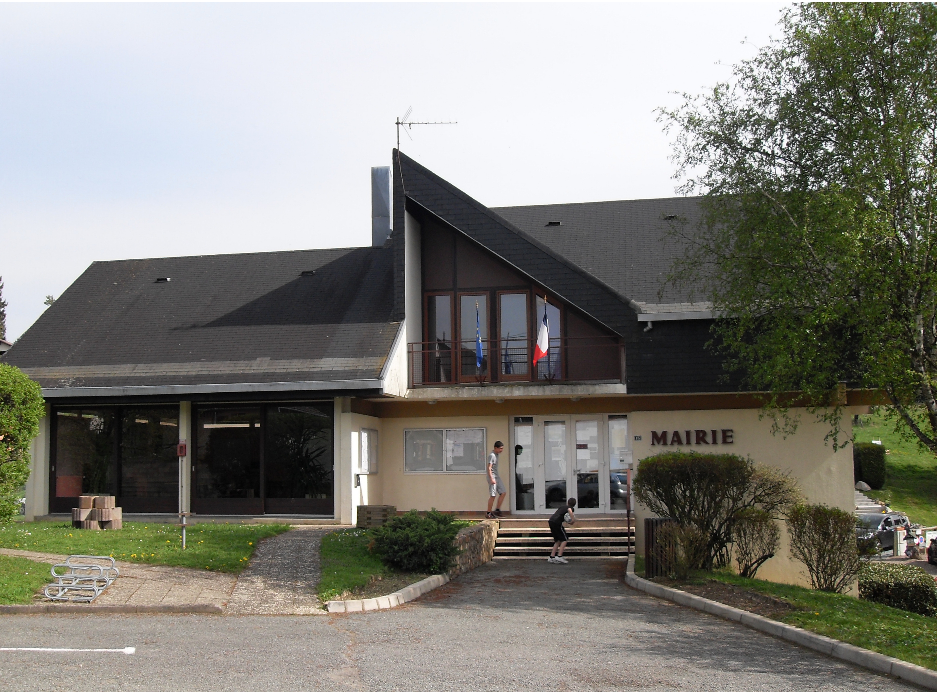 La mairie de Brognard